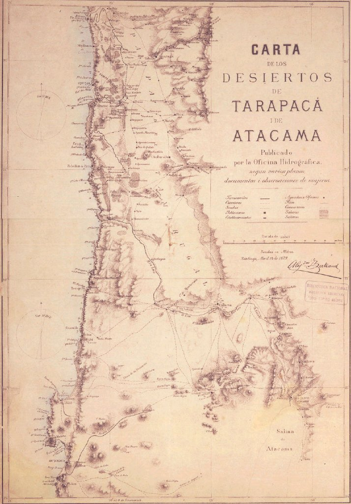 Carta de los Desiertos de Tarapacá i de Atacama (sic)